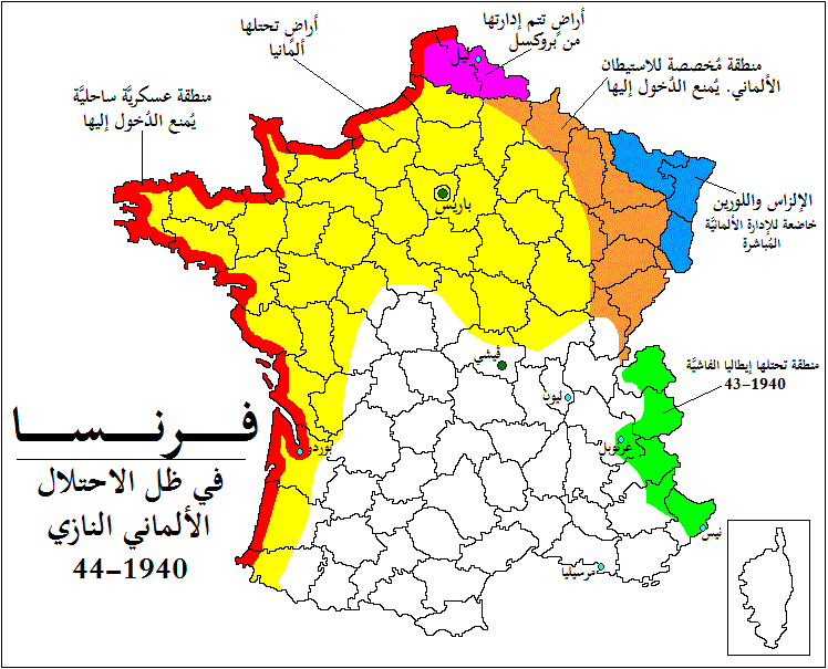 خارطة تُظهر تقسيم فرنسا أبَّان خُضوعها للاحتلال الألماني النازي ما بين سنتيّ 1940 و1944.